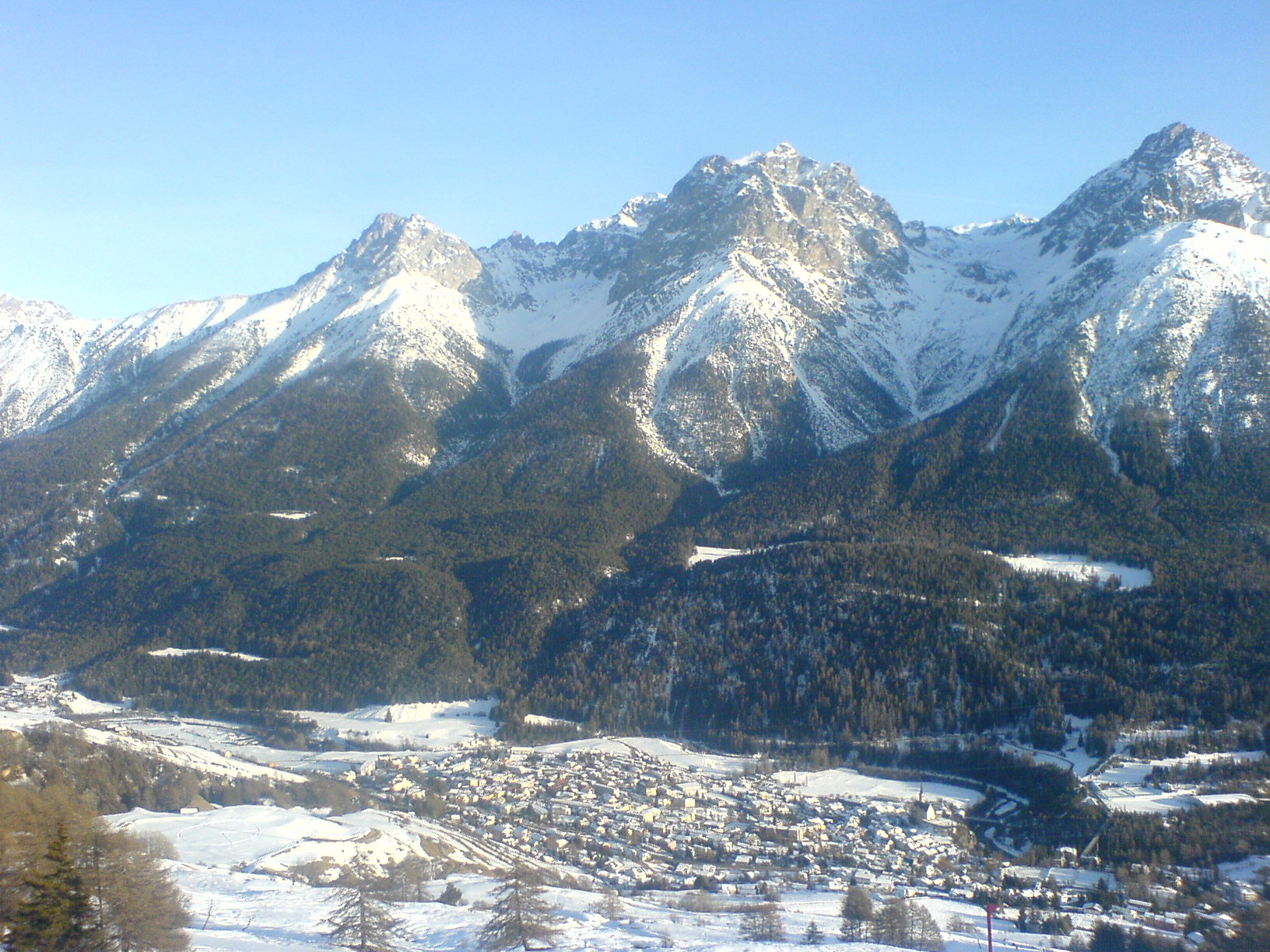 Scuol (CH)